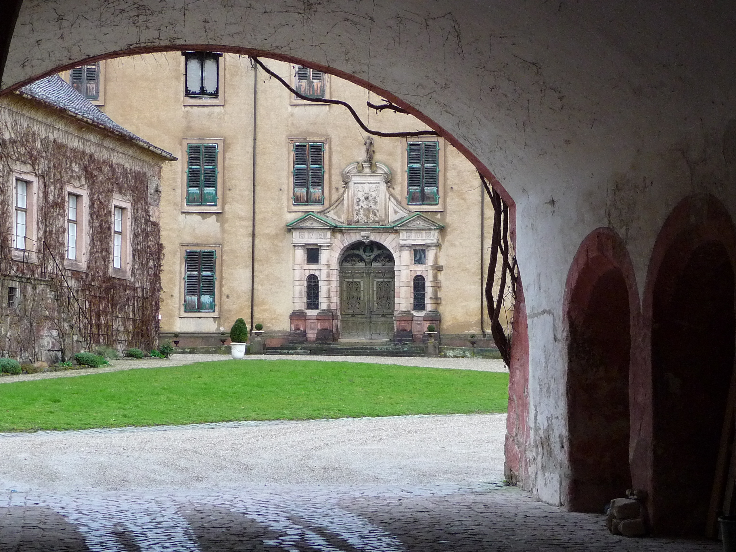 Blick in den Innenhof des Neuen Schlosses in Baden-Baden (Baden-Württemberg, Deutschland)